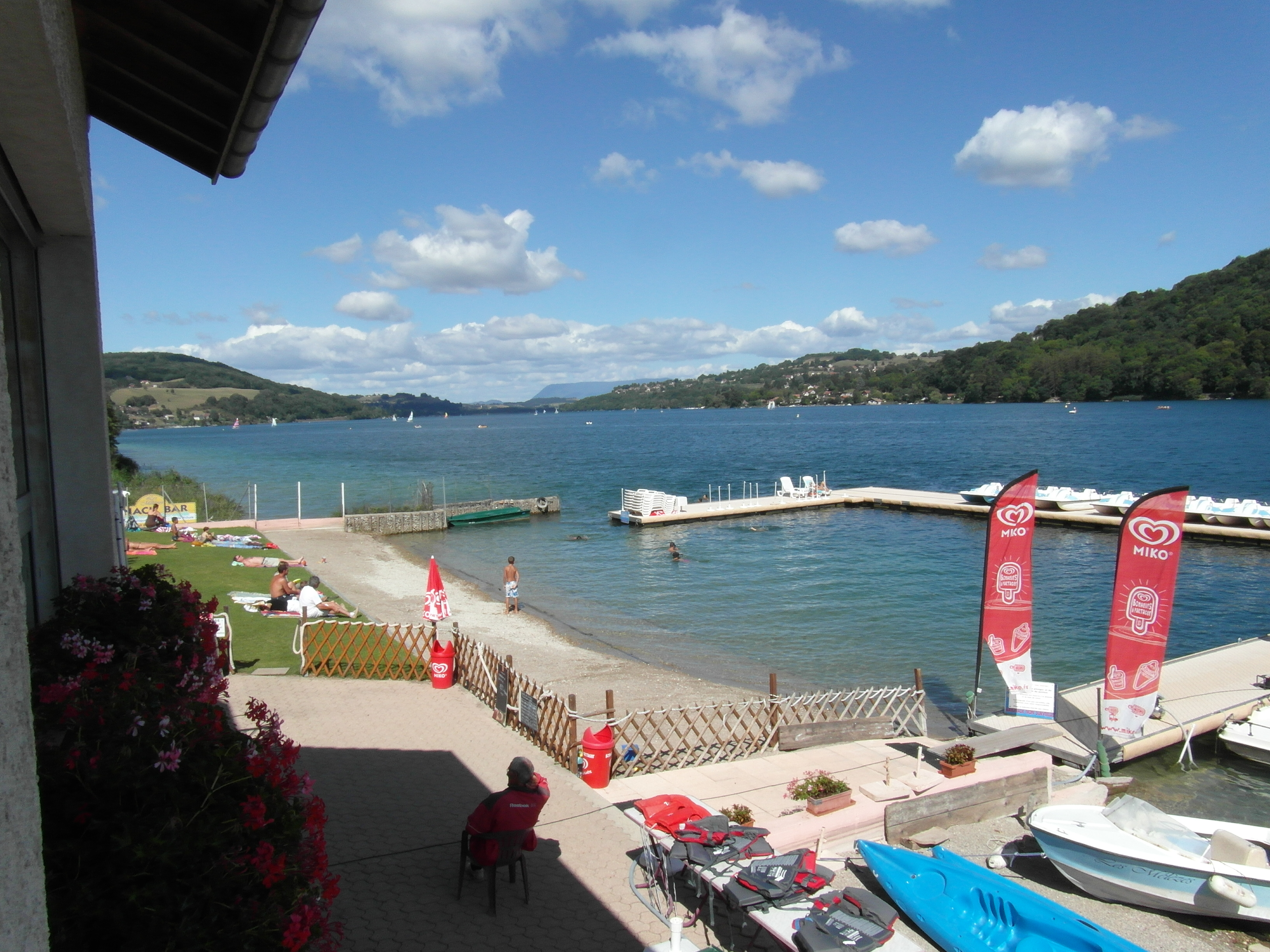 Plage privée et lac de Paladru